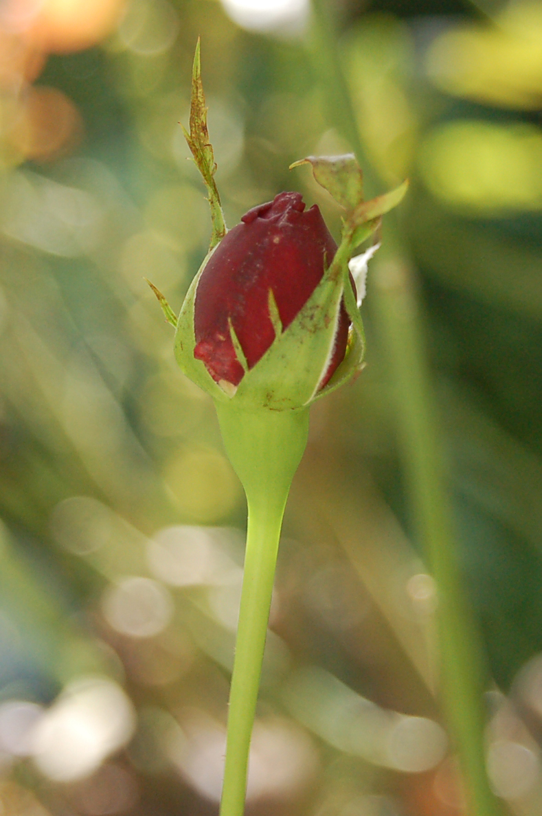 Bourgeon de fleur de rose